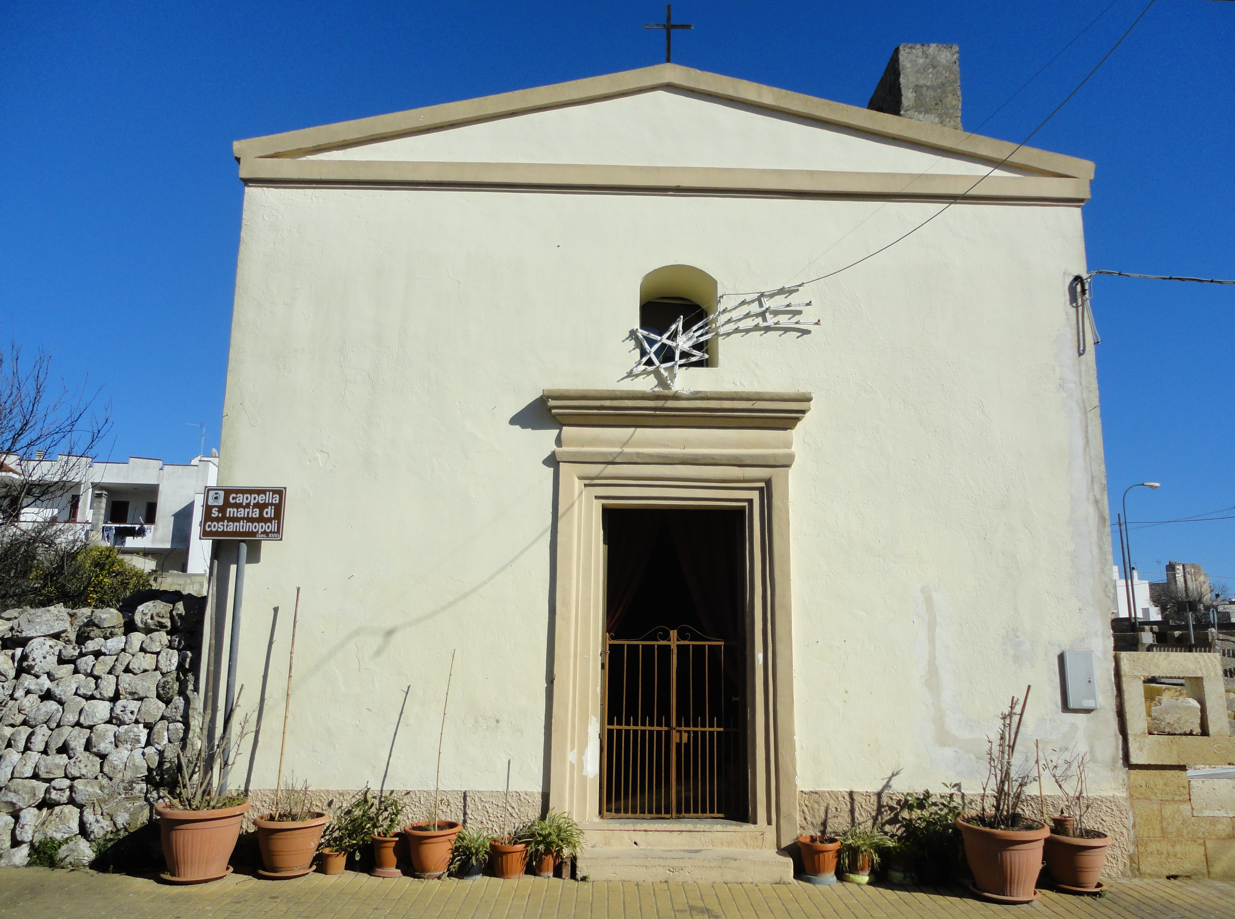 Cappella della Madonna di Costantinopoli Gagliano del Capo